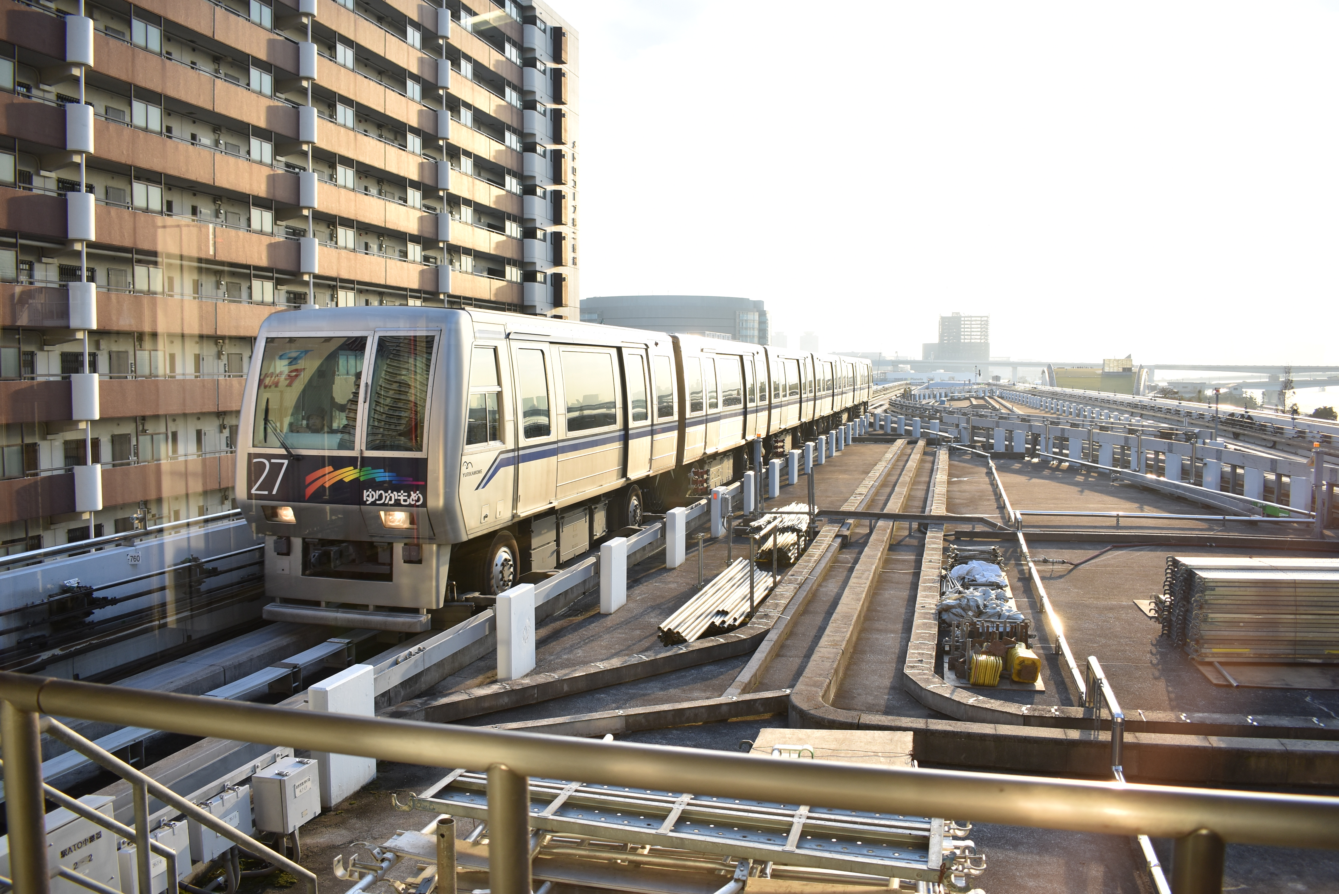 豊洲駅 ゆりかもめ